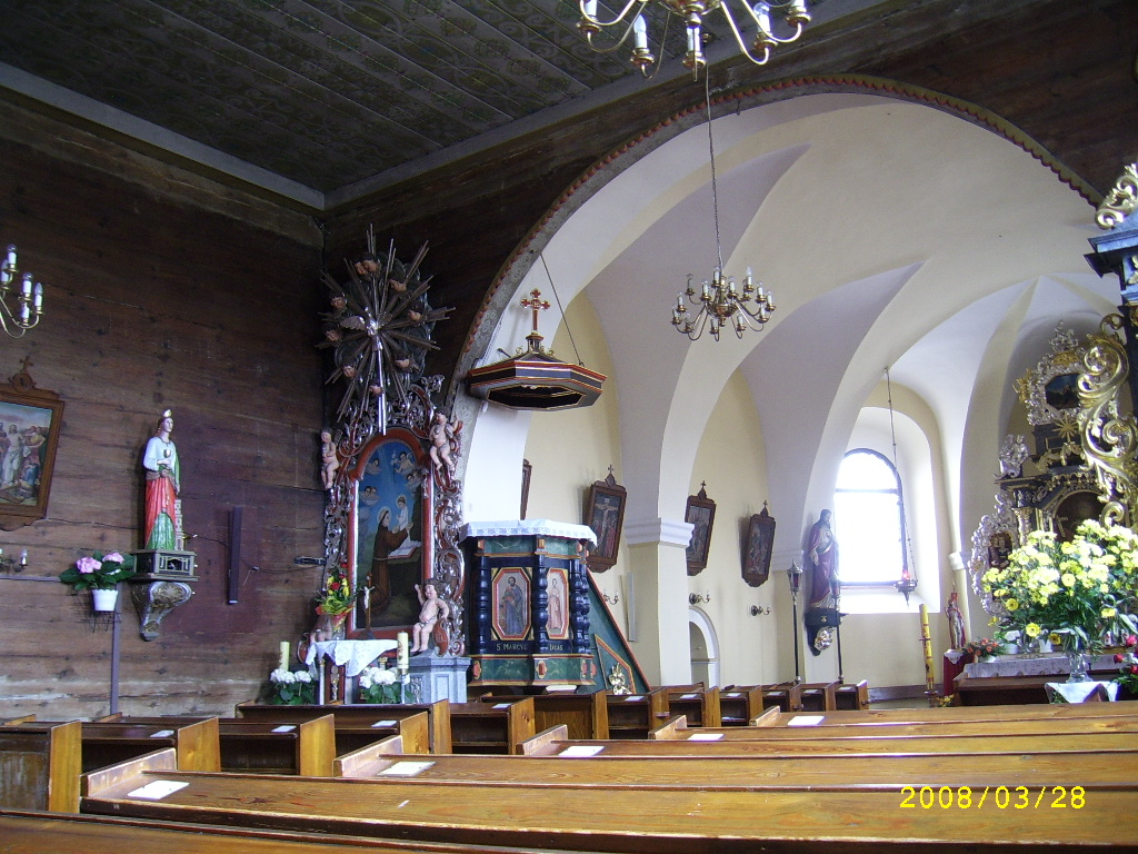 Wnętrze kościoła św. Trójcy w Rachowicach